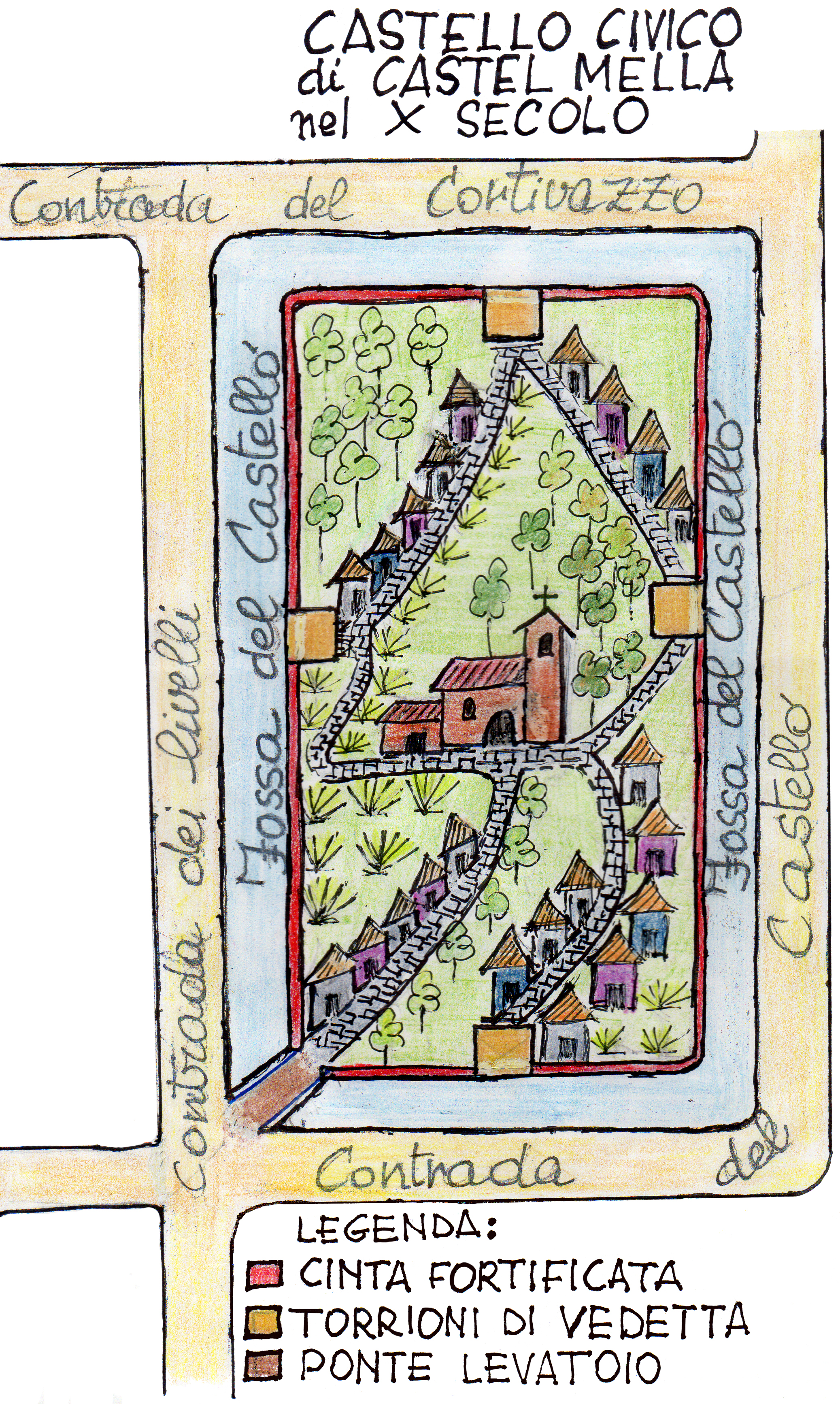 Lo storico Giovanni Guzzoni ha ricostruito il castello civico altomedievale di Castel Mella, partendo dalla mappa napoleonica del 1810 (c/o l’Archivio di Stato di Brescia), che disegna un quadrilatero delimitato dalla “Fossa del Castello” e dalla “Contrada del Castello”.